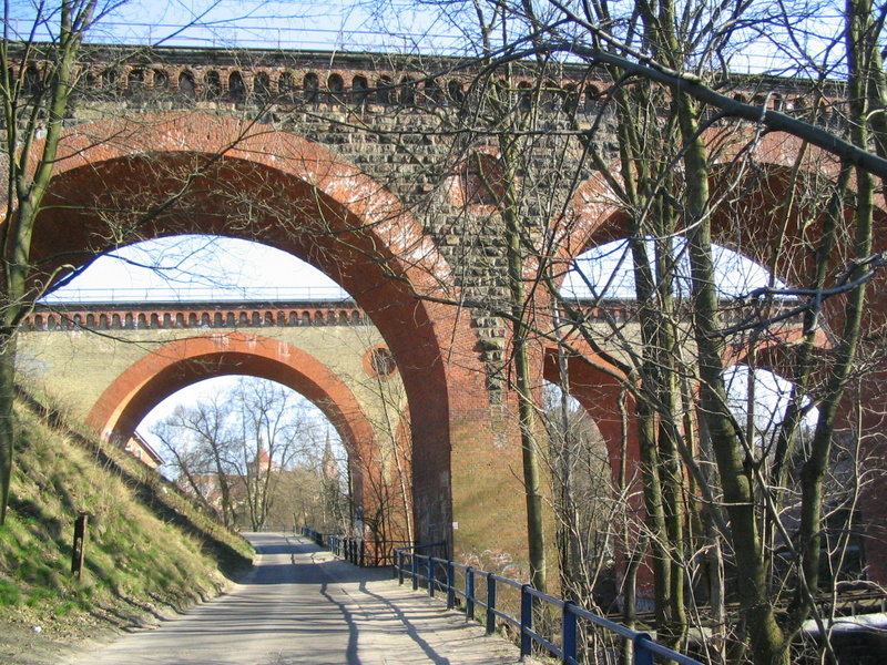 Wiadukt kolejowy w przełomie Łyny w Olsztynie